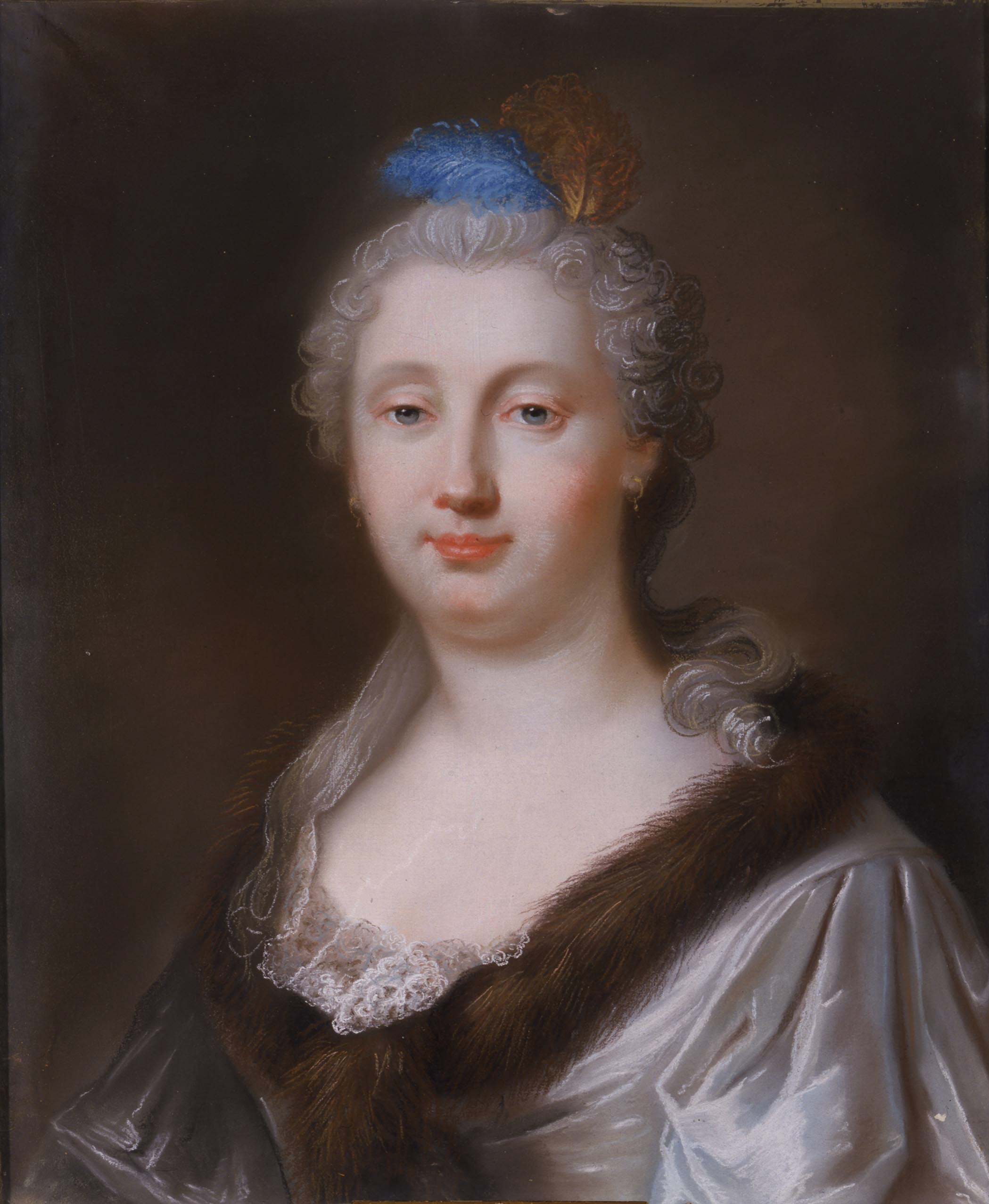 Autorretrato de la pintora francesa Faraona Olivieri, que fue la esposa del arquitecto Jaime Marquet.